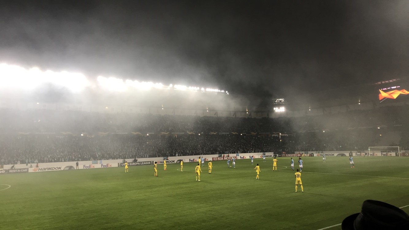 Match mellan Malmö FF och Chelsea på Stadion i Malmö i Uefa Europa League 2018/19